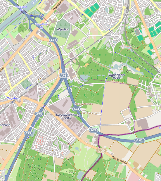 Kaart Rijksweg 74